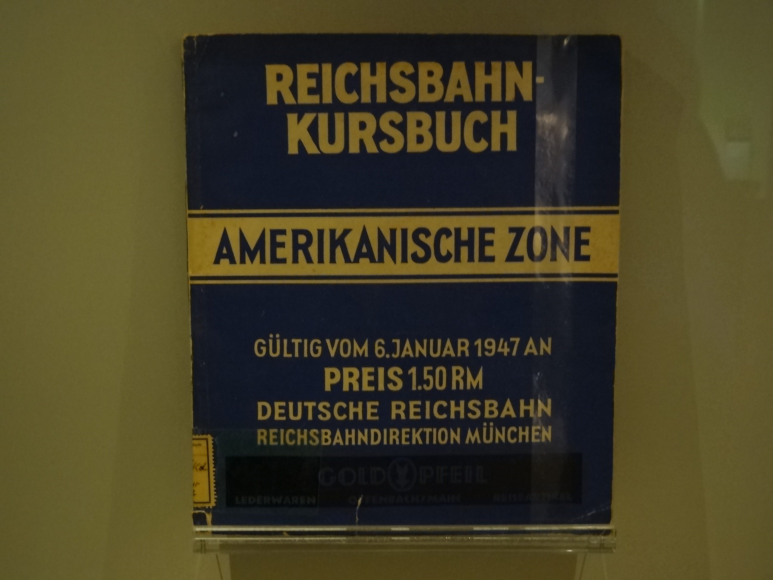 Train timetables in Germany 1947